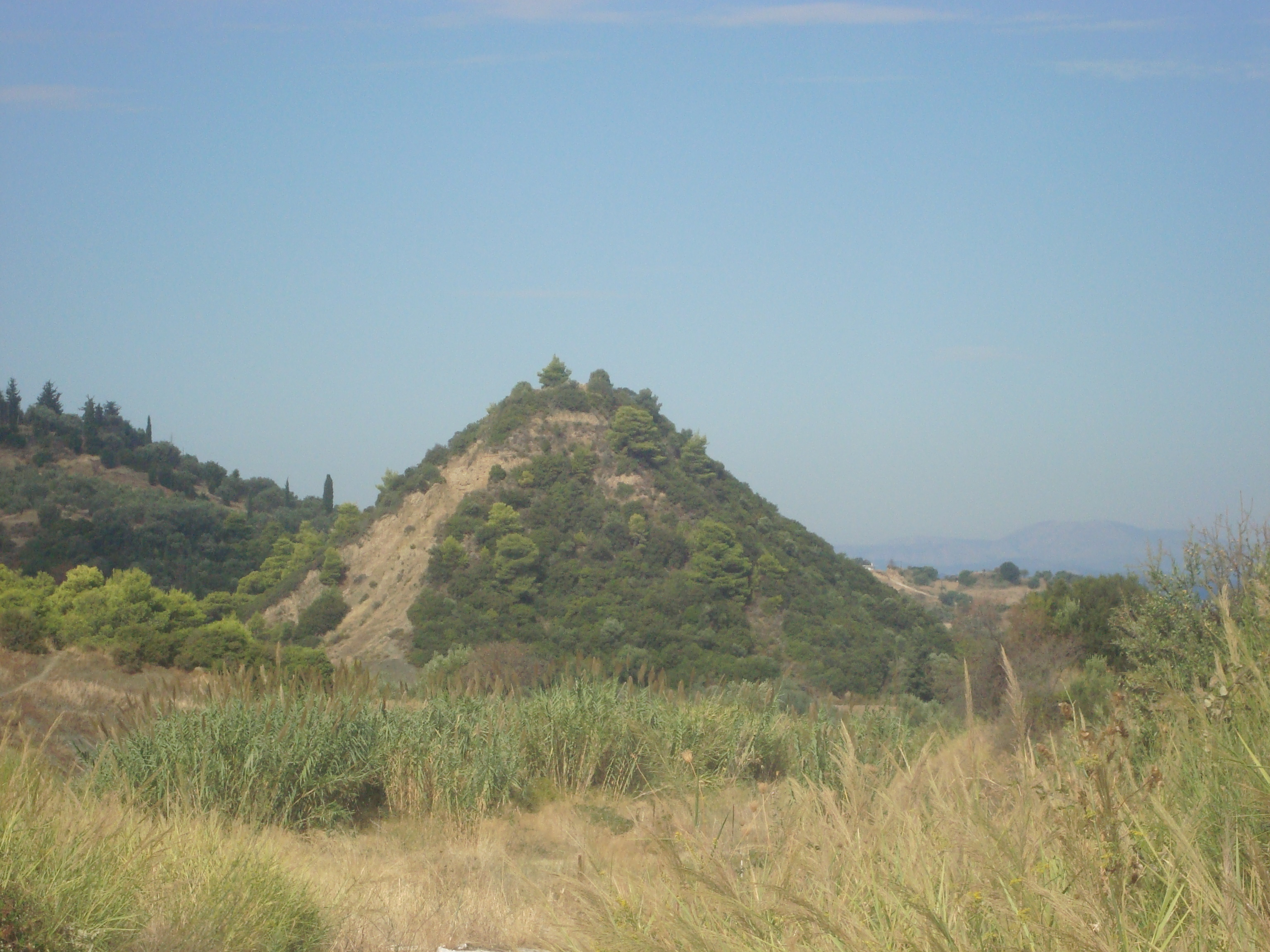 Ο λόφος στην μέρια του οποίου ήταν το παυλόκαστρο Unknown